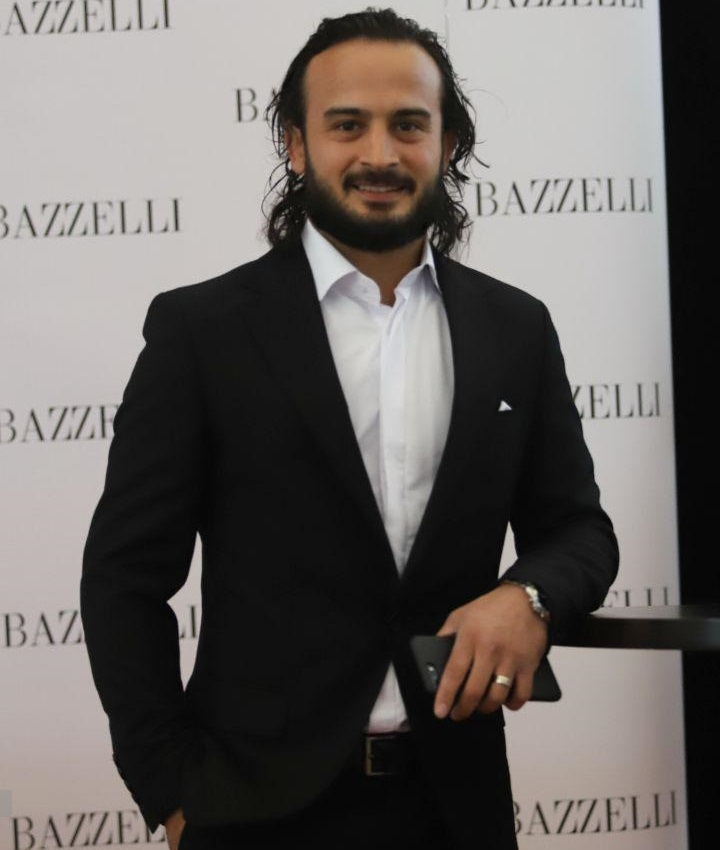 گزارش تصویری از مراسم برترین‌های لیگ برتر فوتبال در فصل 97-98